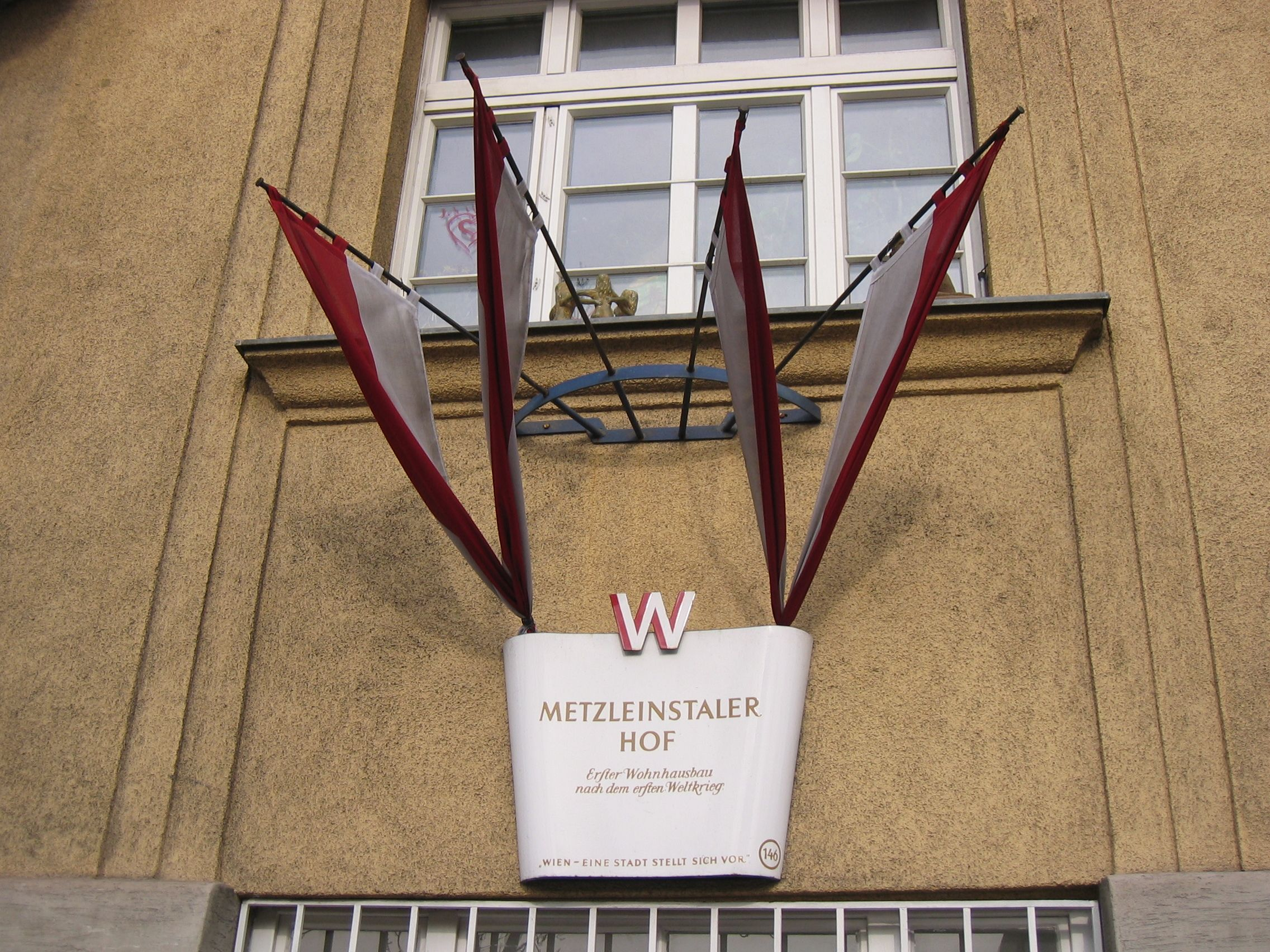 Schild der Stadt Wien: Erster Gemeindebau Metzleinstaler Hof